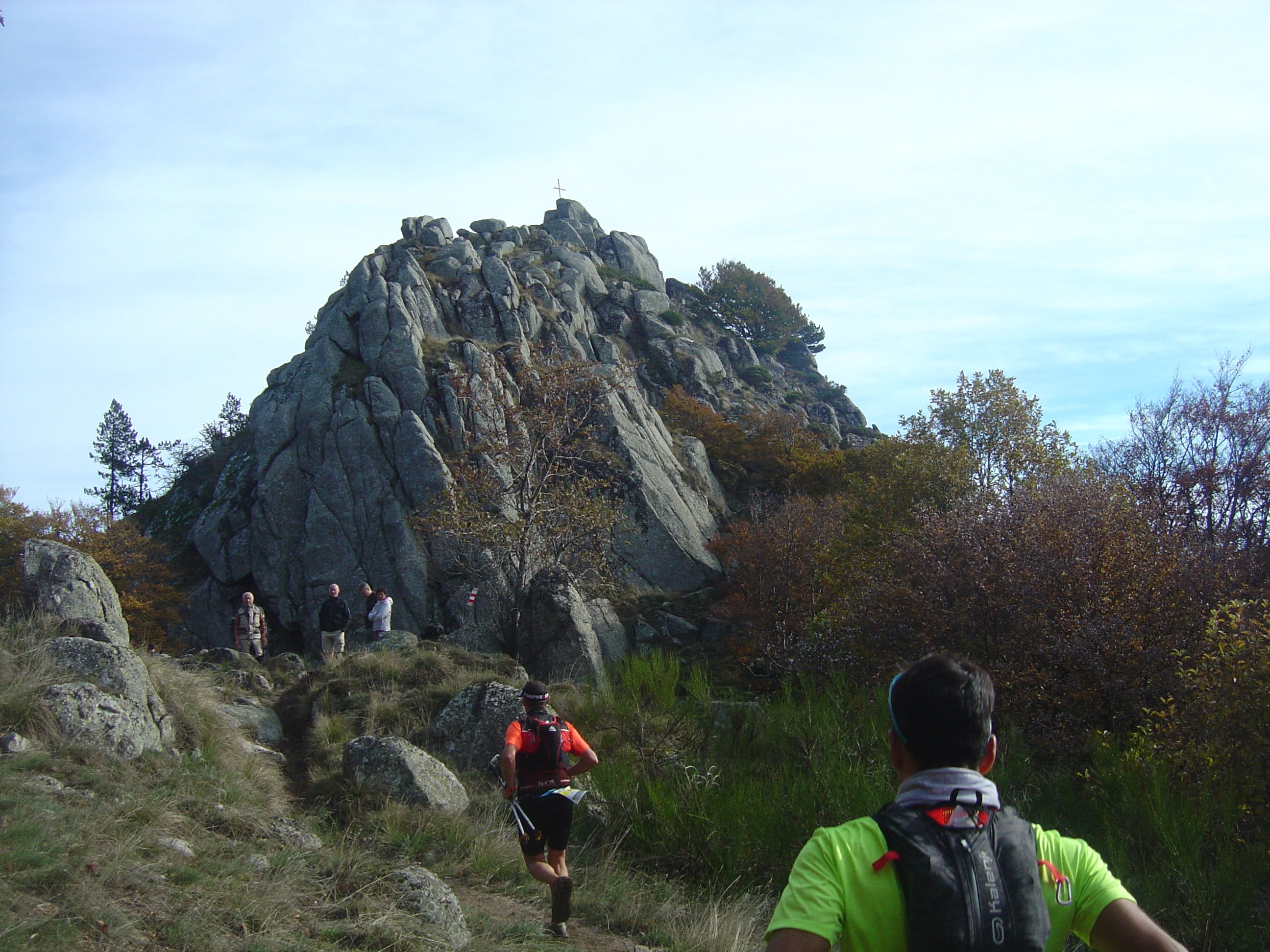 Le pic Saint-Guiral (1366m) franchi sur le trail des Hospitaliers en octobre 2019, au 36ème kilomètre